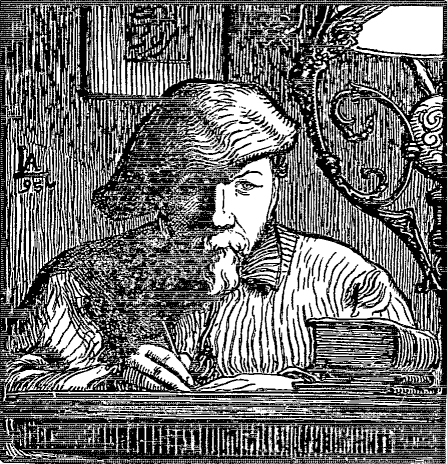 Autoportrait d'Auguste Lepère (1849-1918)